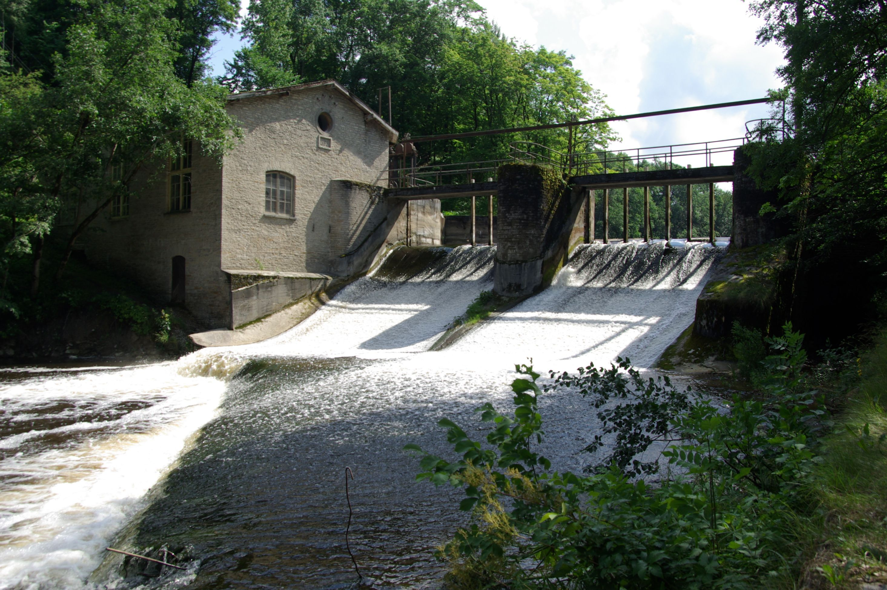 Lääne-Viru maakond, Kunda linn